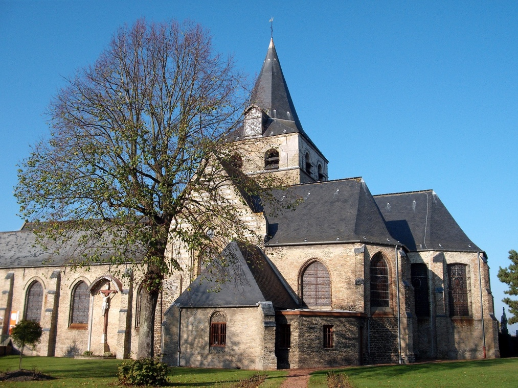 Eglise de Pitgam